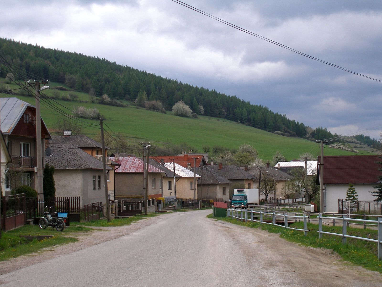 Obec Lipovce okres Prešov región Šariš